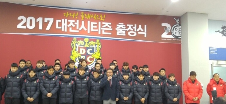 시즌전 대전시티즌 출정식